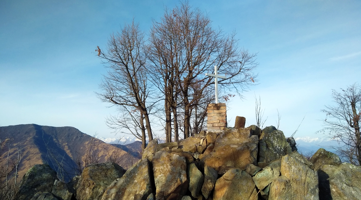 La cima del Monte Bernard (La Cassa / Varisella, TO), a sinistra sullo sfondo il monte Druina e il Ròc Neir